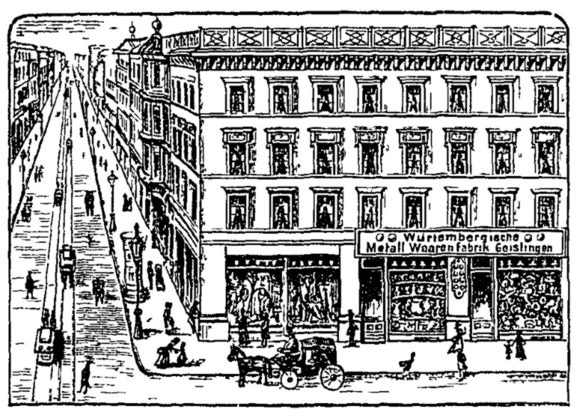 WMF-Lagerhaus in Berlin